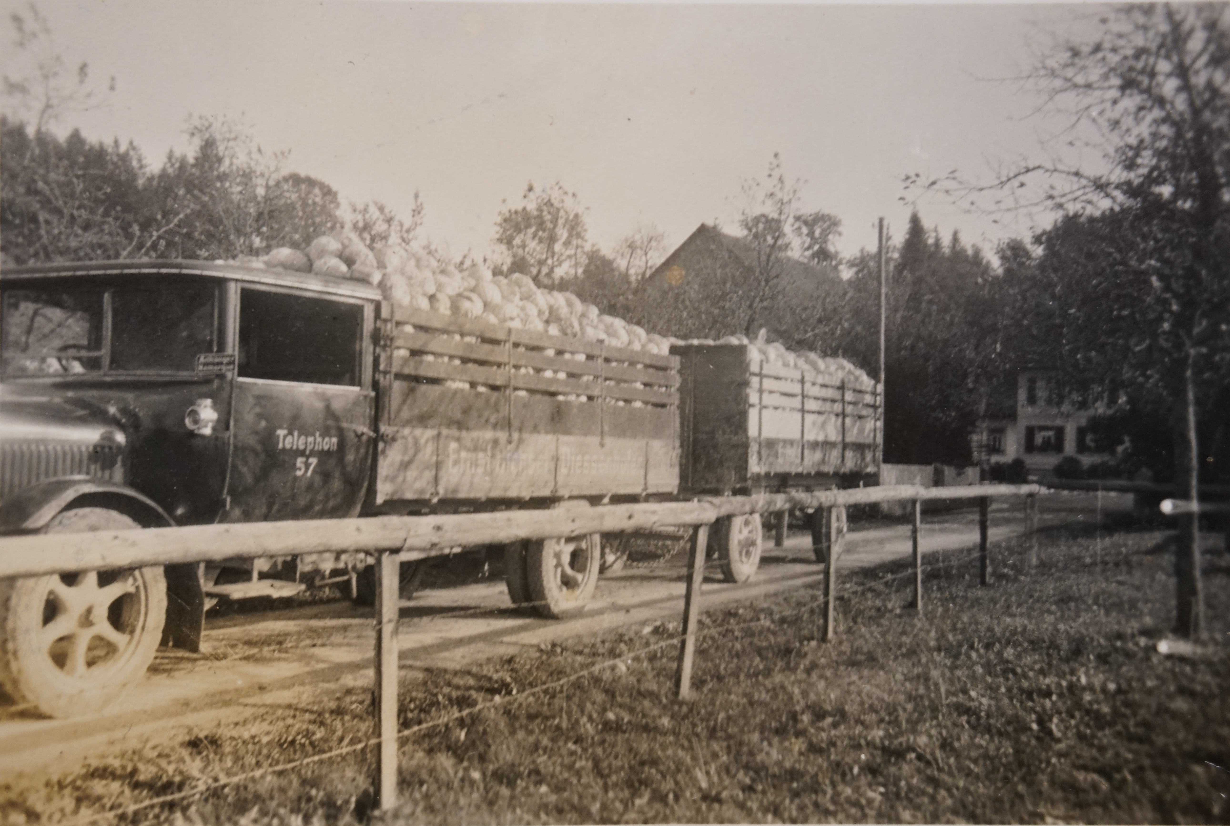 Gemüsetransport (Kohlköpfe) mit LKW um 1920 vor der Hauptzufahrt zum Kundelfingerhof